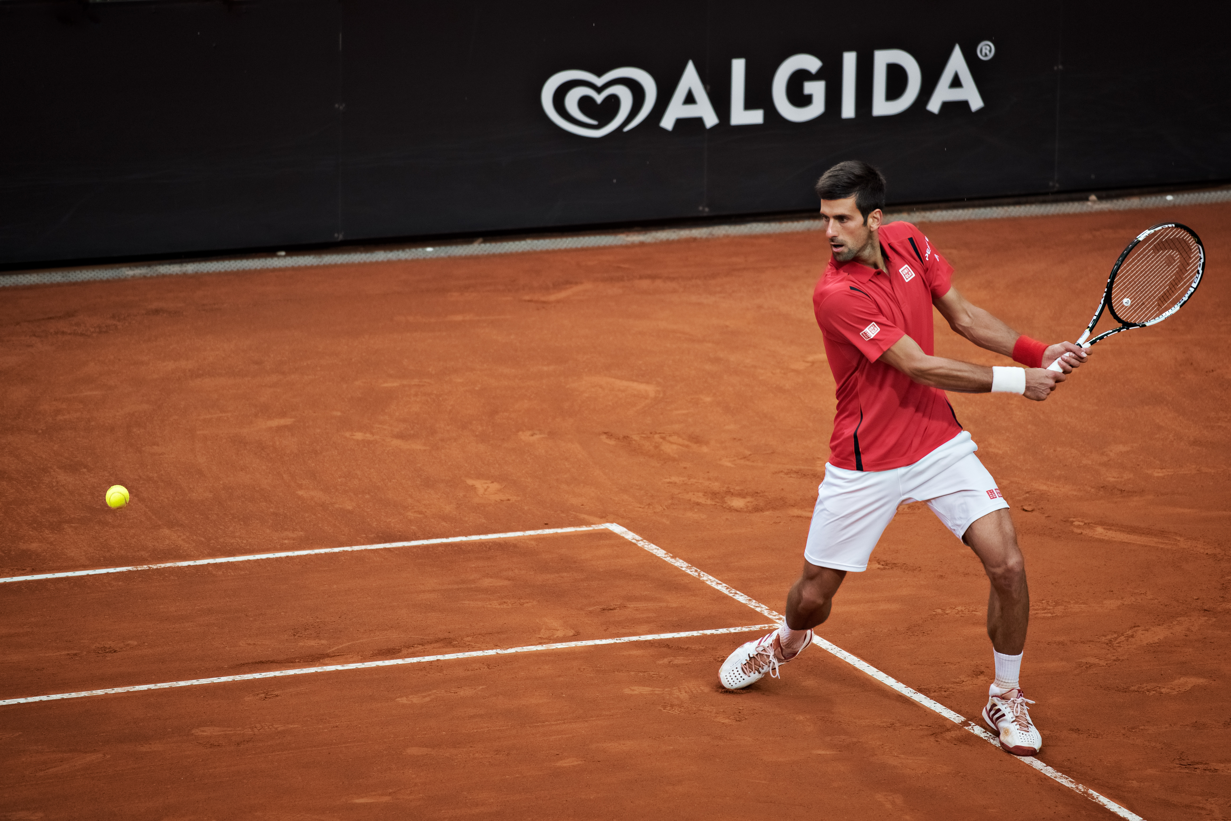 Internazionali BNL d'Italia 2016. Roma. #ibi16